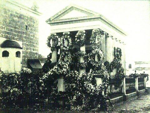 Sepelio de Manuel Estrada Cabrera